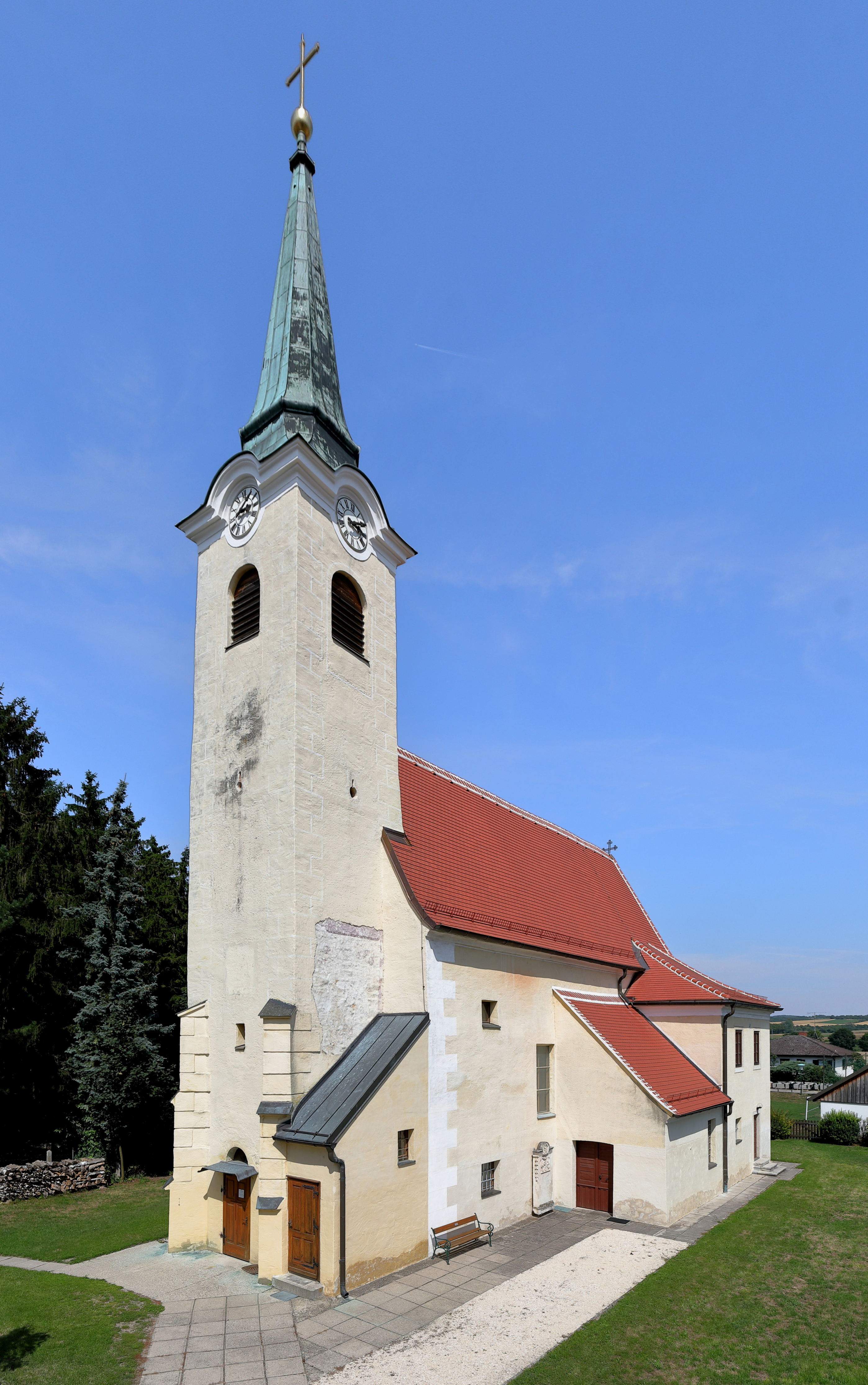 Südwestansicht der röm.-kath. Pfarrkirche hll. Peter und Paul in Sonnberg, ein Ortsteil der niederösterreichischen Stadtgemeinde Hollabrunn.